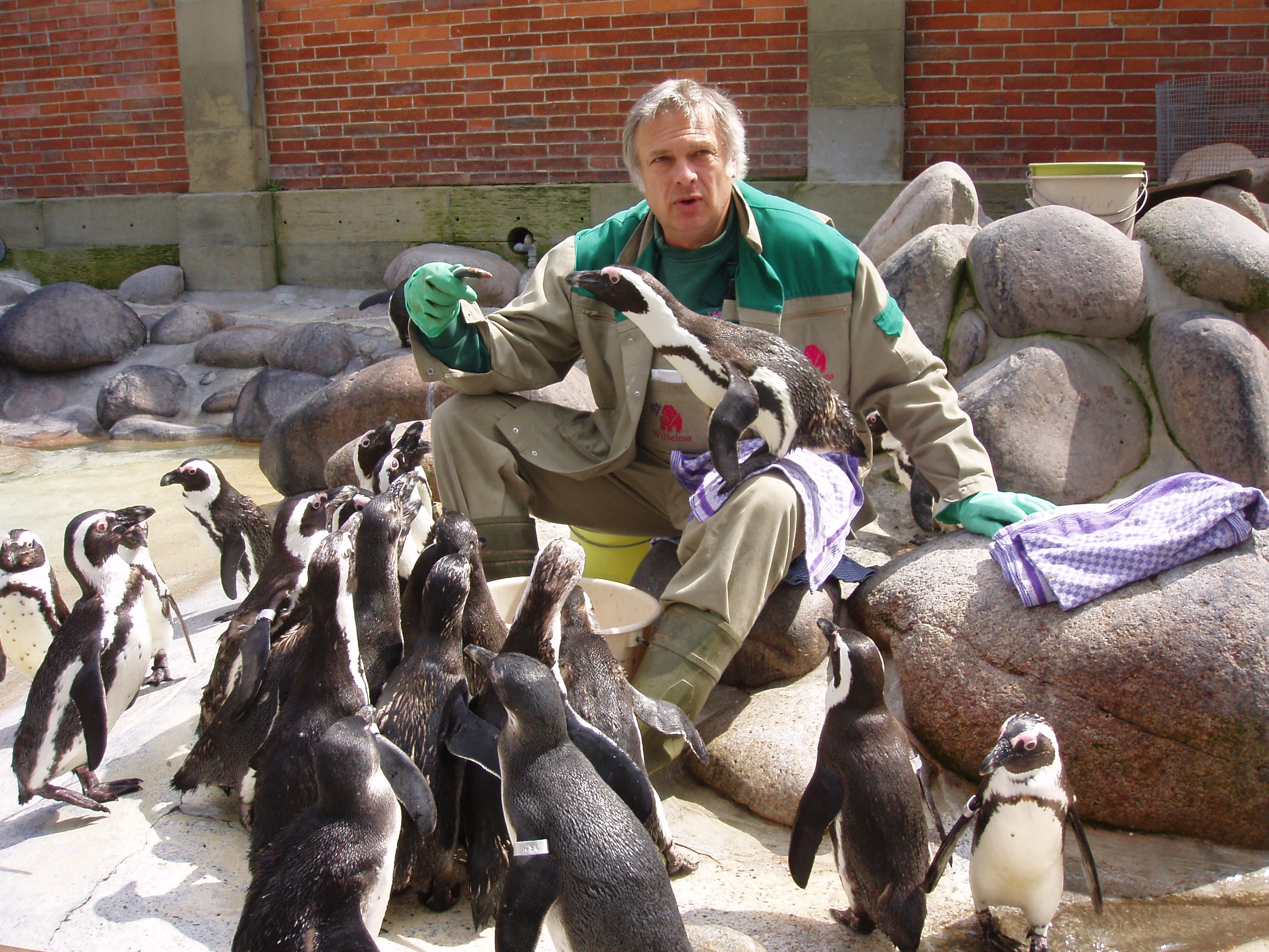 Pinguinfütterung